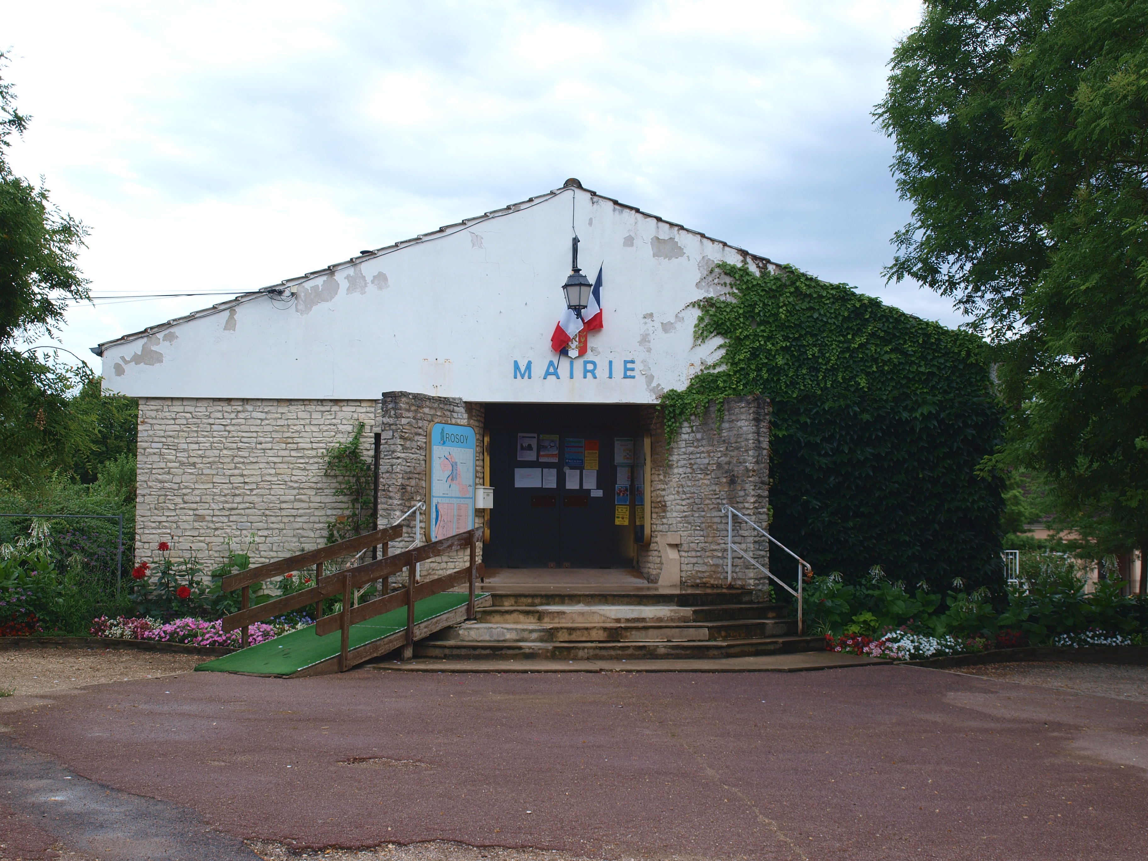 Rosoy (Yonne, France) , mairie.